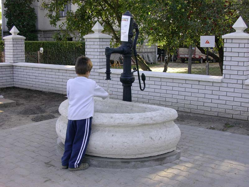 Kajászó - artézi kút - saját fotó